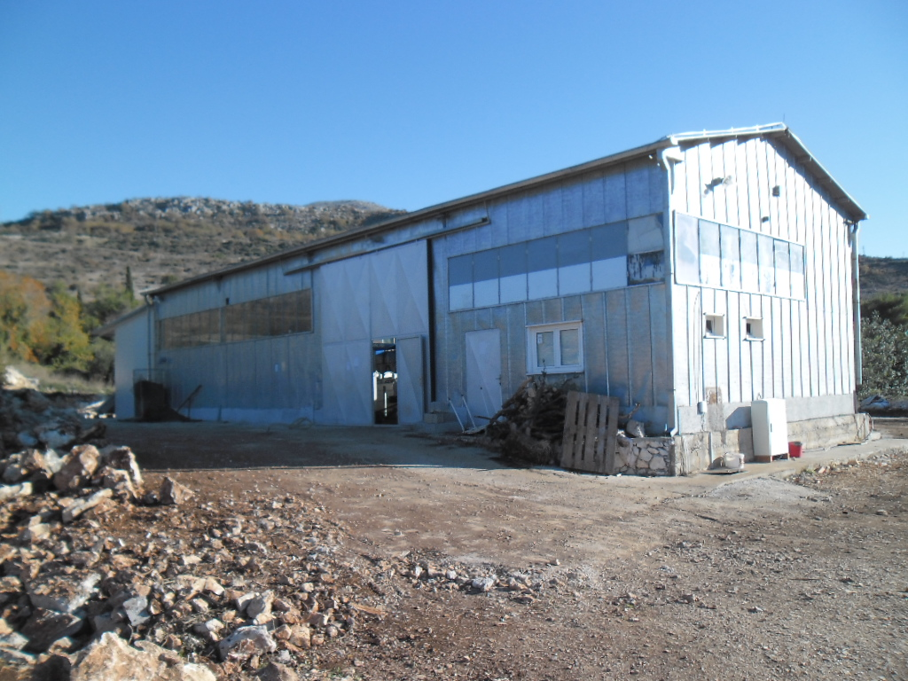 uljara Banići